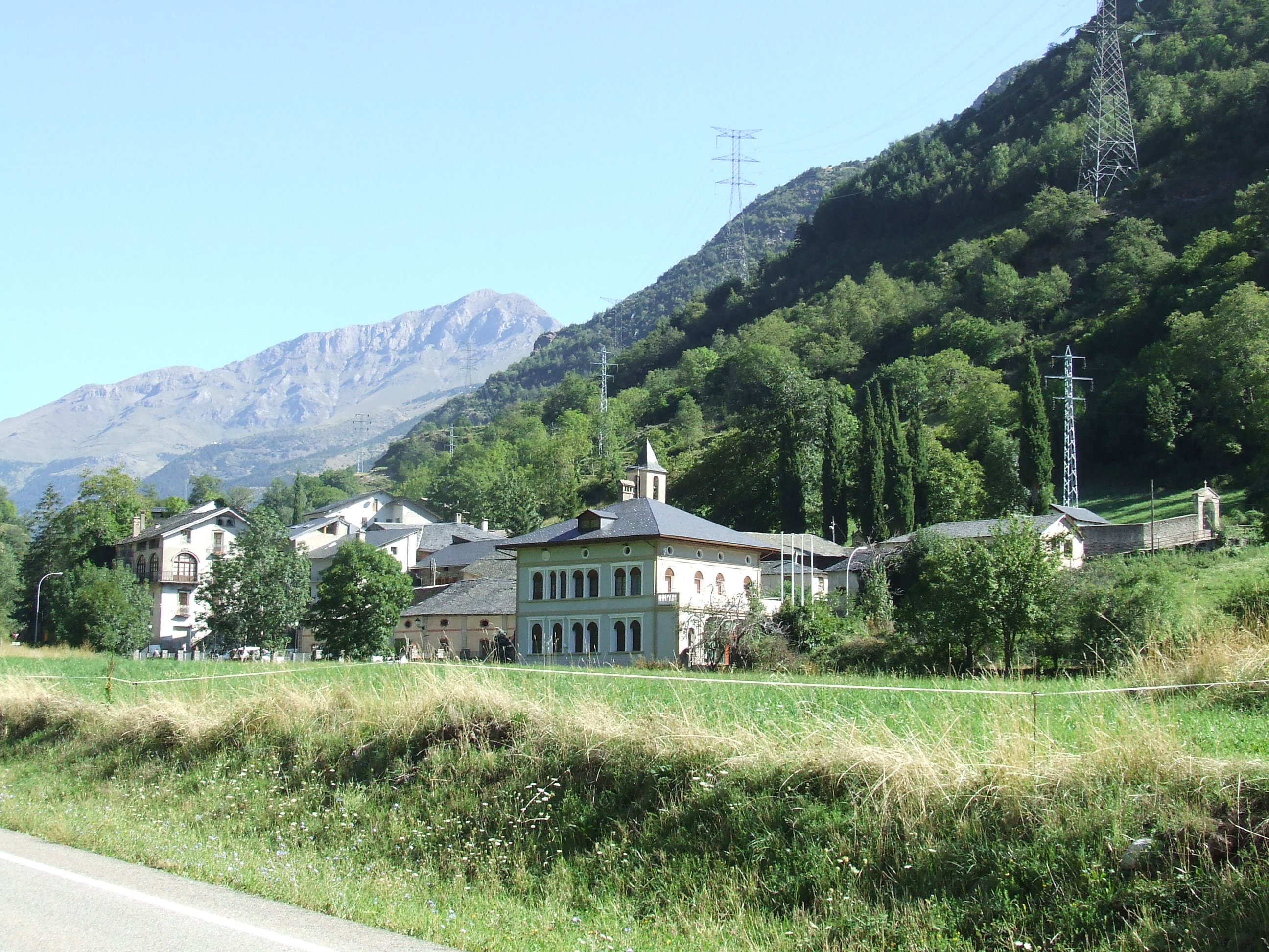 La Torre de Cabdella (Pallars Jussà)